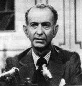 Foto de Martinez de Hoz